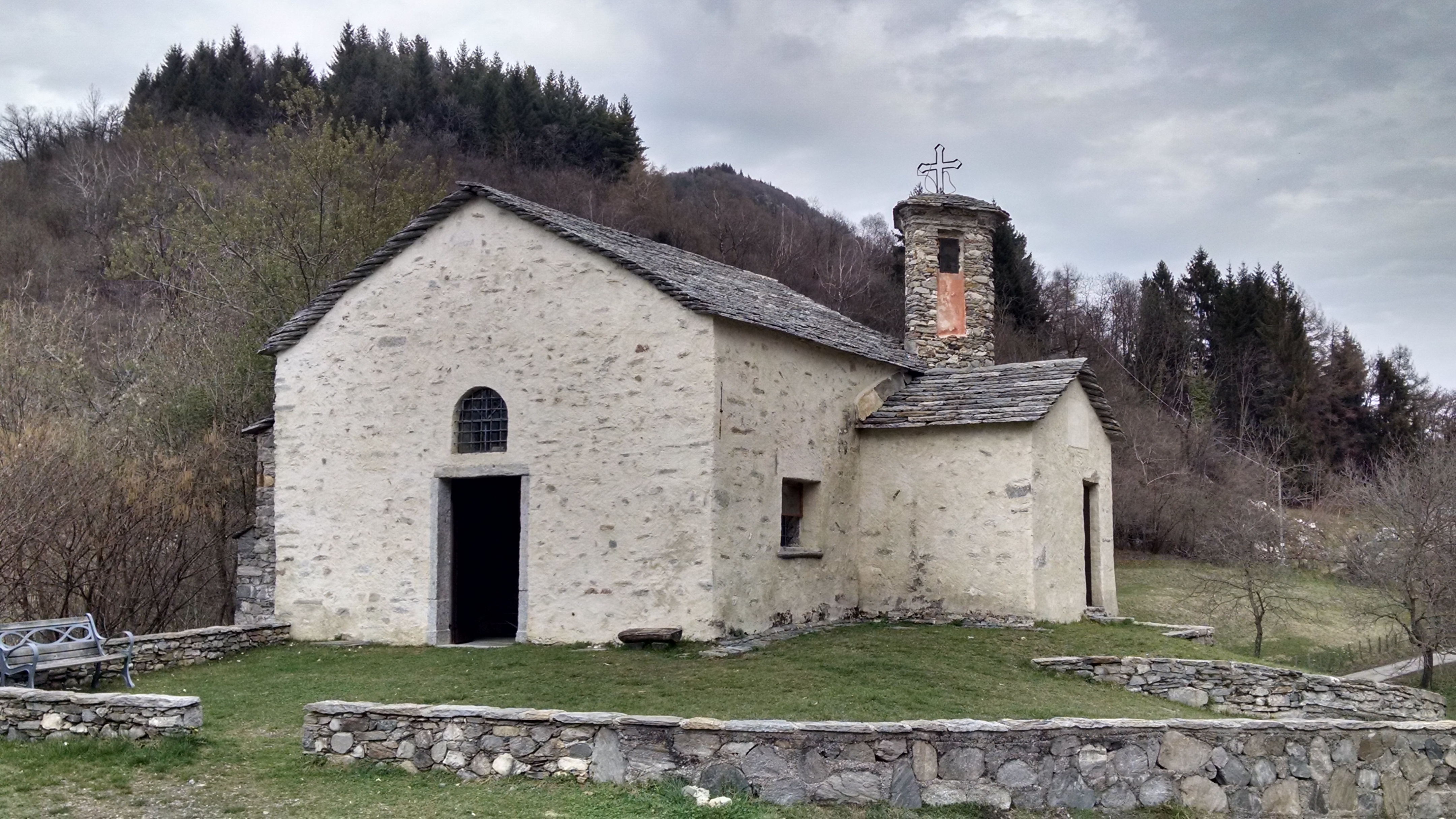 Chiesa di San Michele al Monte - Porto Valtravaglia, frazione San. Michele